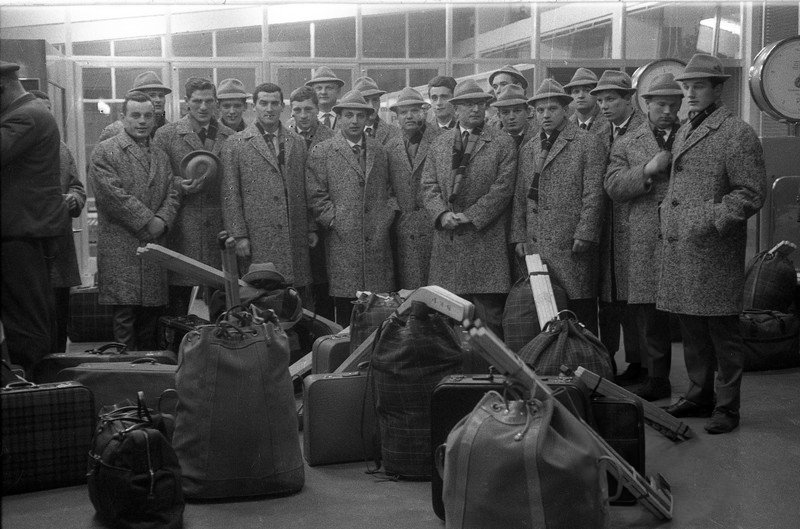 Hokejisti na svetovno prvenstvo v hokeju na ledu, v reprezentanci pa so bili: Gele, Šemsedinovič, Ivo Jan, Kristan, Ravnik, Trebušak, Felc, Klinar, Tišler, Beravs, Hiti, Smolej, Bogo Jan, Zupančič, Renaaud in Đorđević.